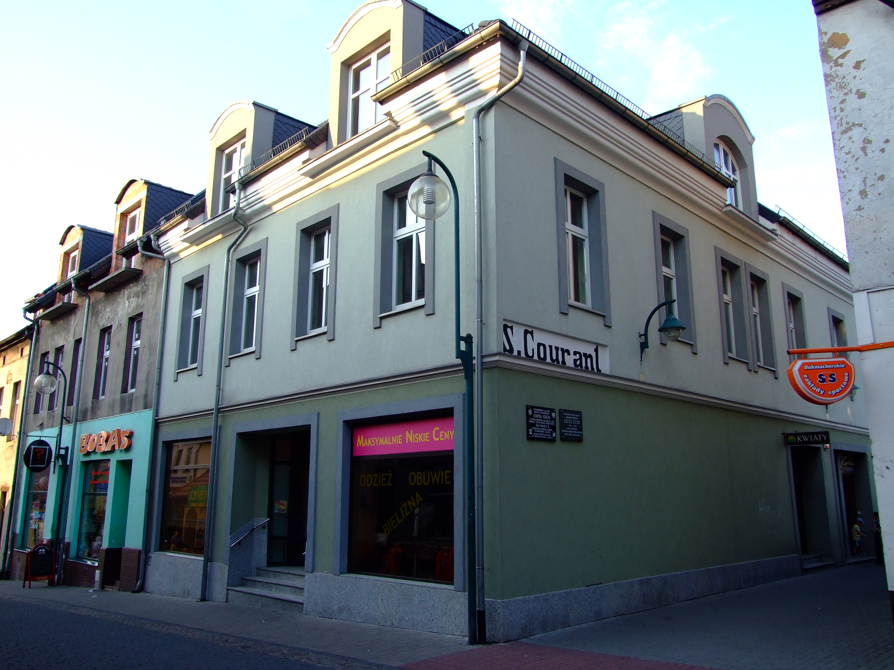 Dom Courantów, dziadków św. Edyty Stein, w Lublińcu